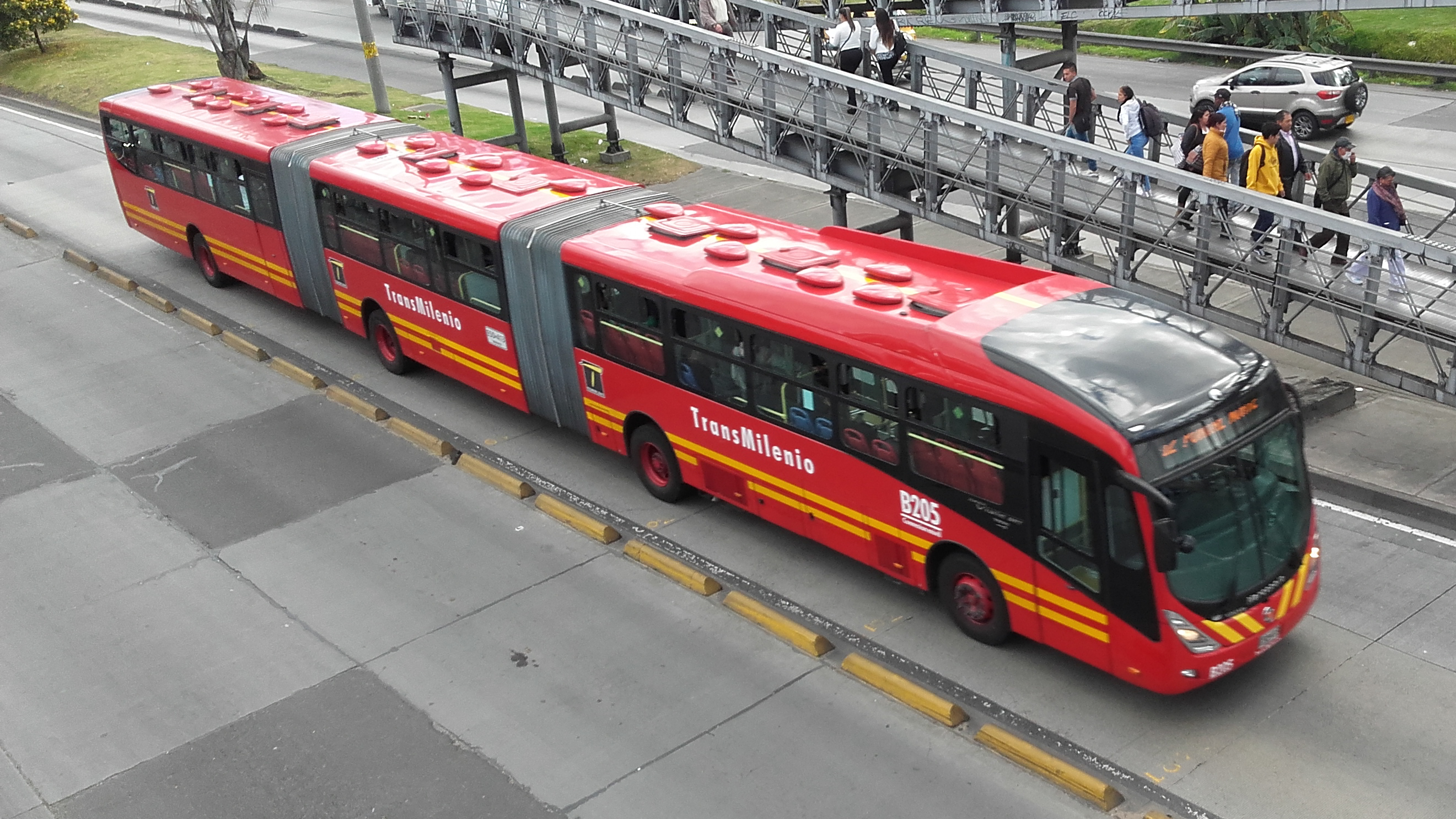 ndfnnfmdndz